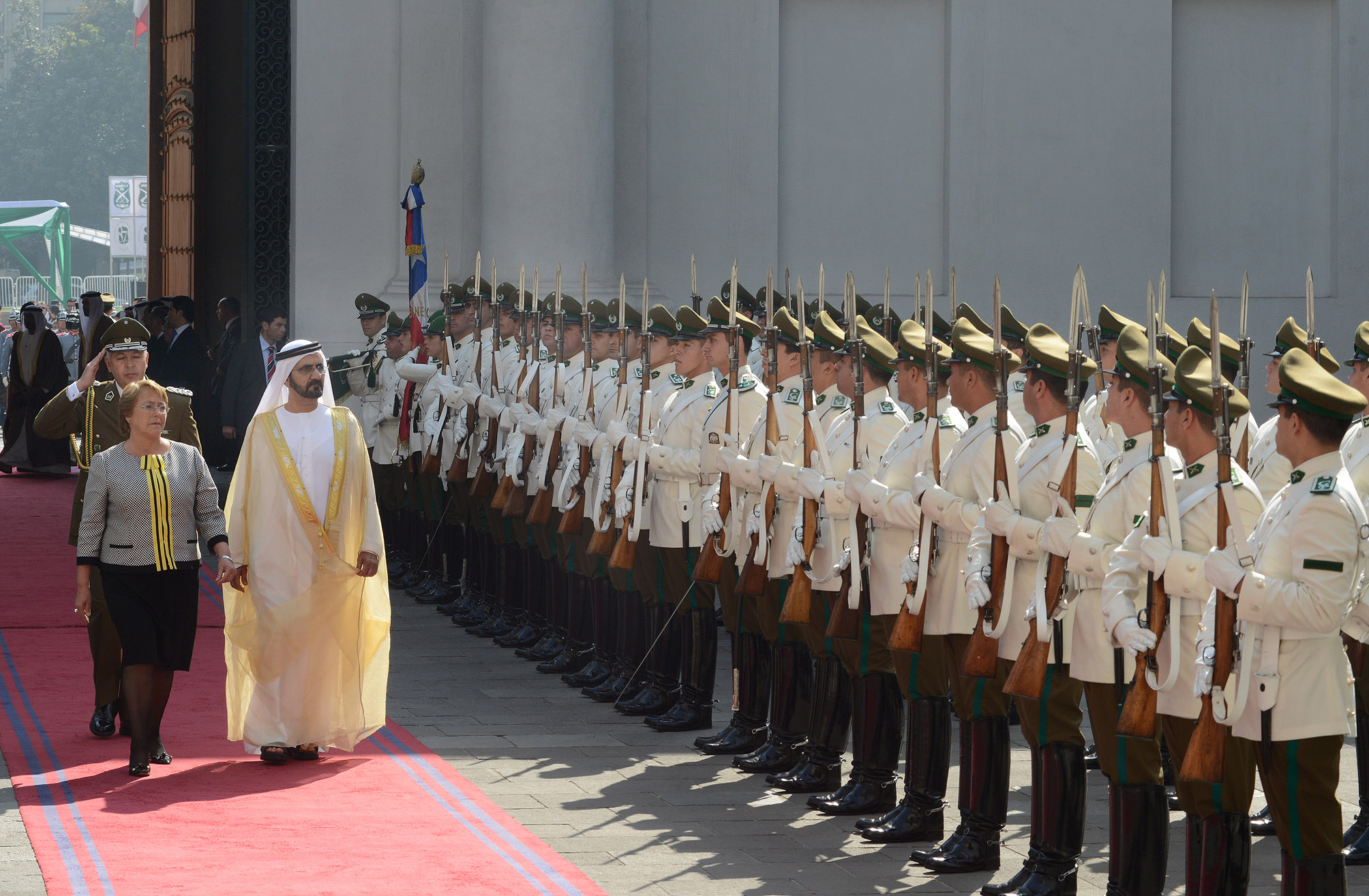 La Presidenta recibió la visita oficial de S.A. Jeque Mohammed Bin Rashid al Maktoum, Vicepresidente y Primer Ministro de Emiratos Árabes